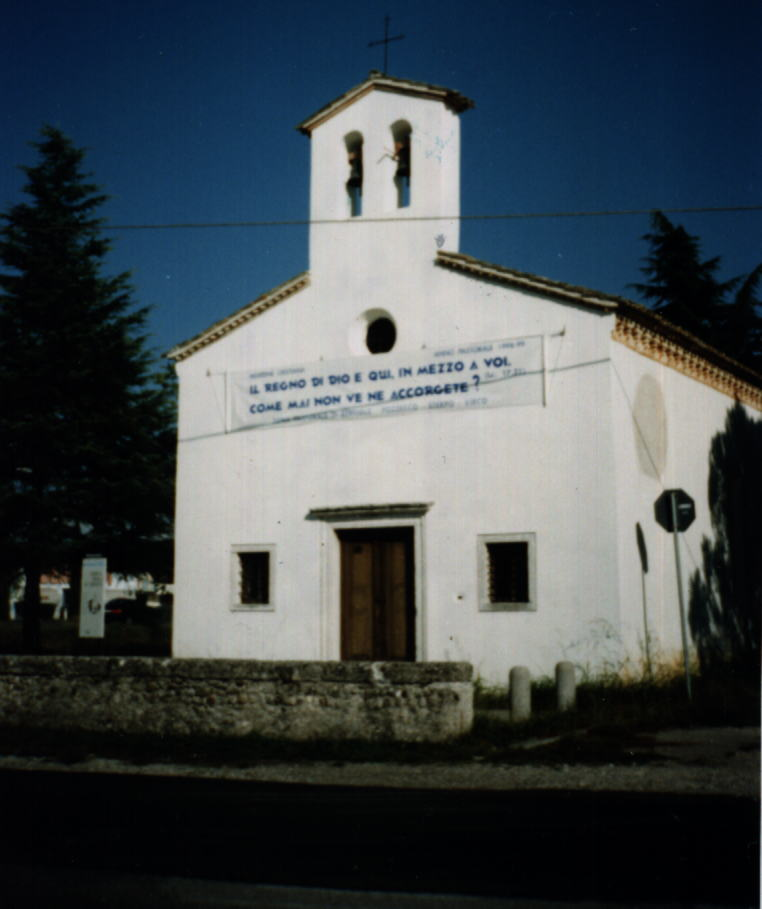 Beriolo, chiesa della Santissima Trinità.